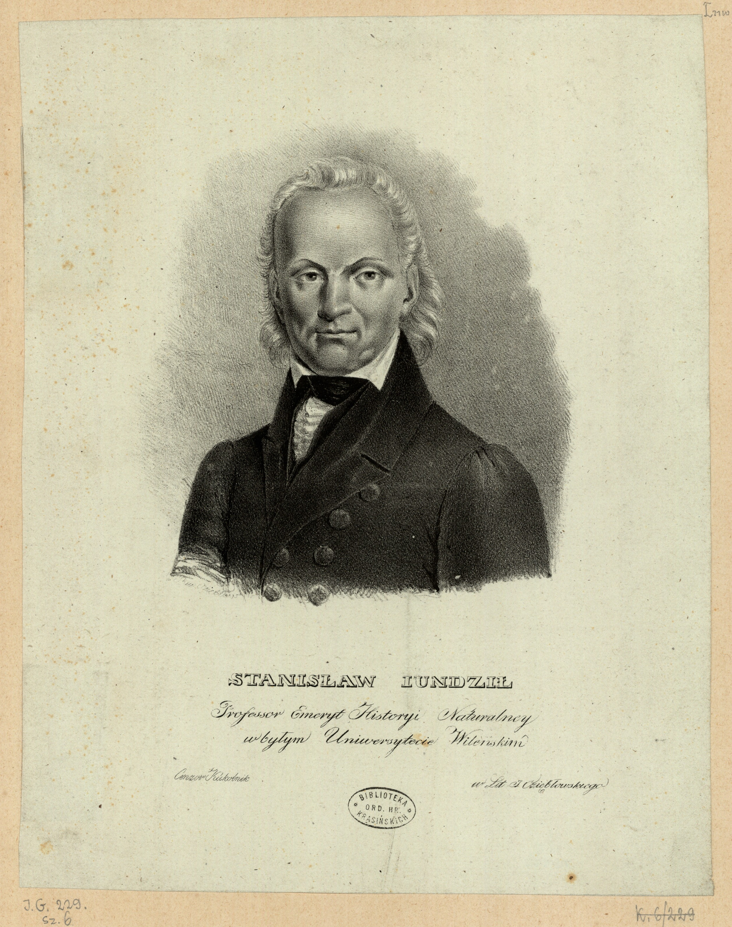 Беларуская (тарашкевіца): Партрэт Станіслава Юндзіла (Stanisłaŭ Jundził)